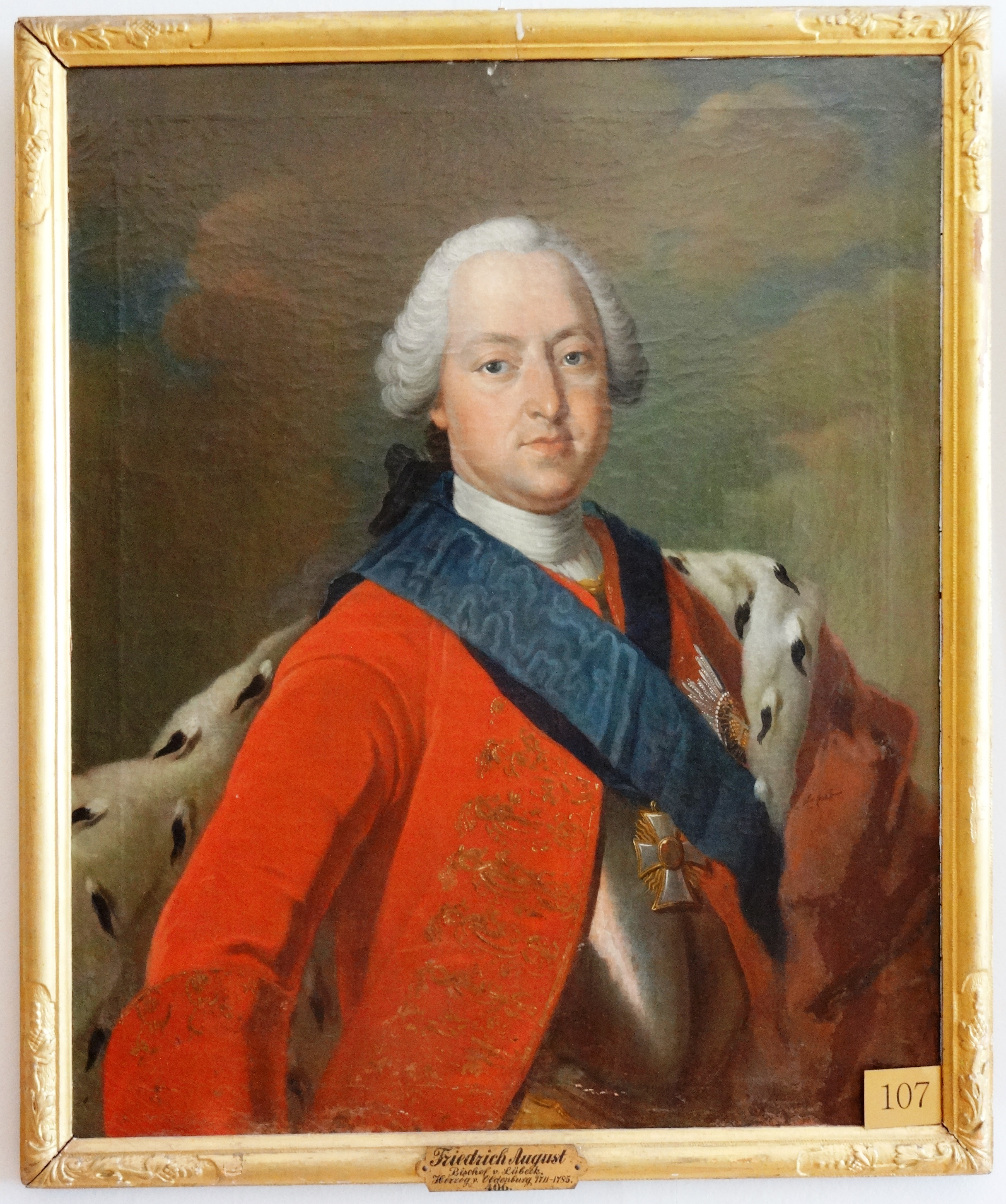 Friedrich August, Bischof von Lübeck, als junger Mann, zeitgenössisches Gemälde